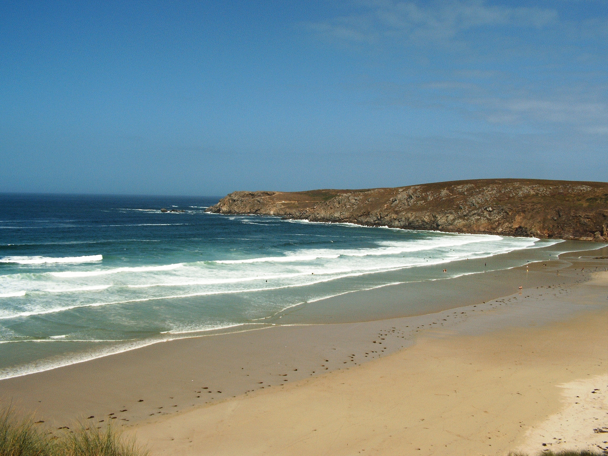 Baie des Trépassés in der Bretagne